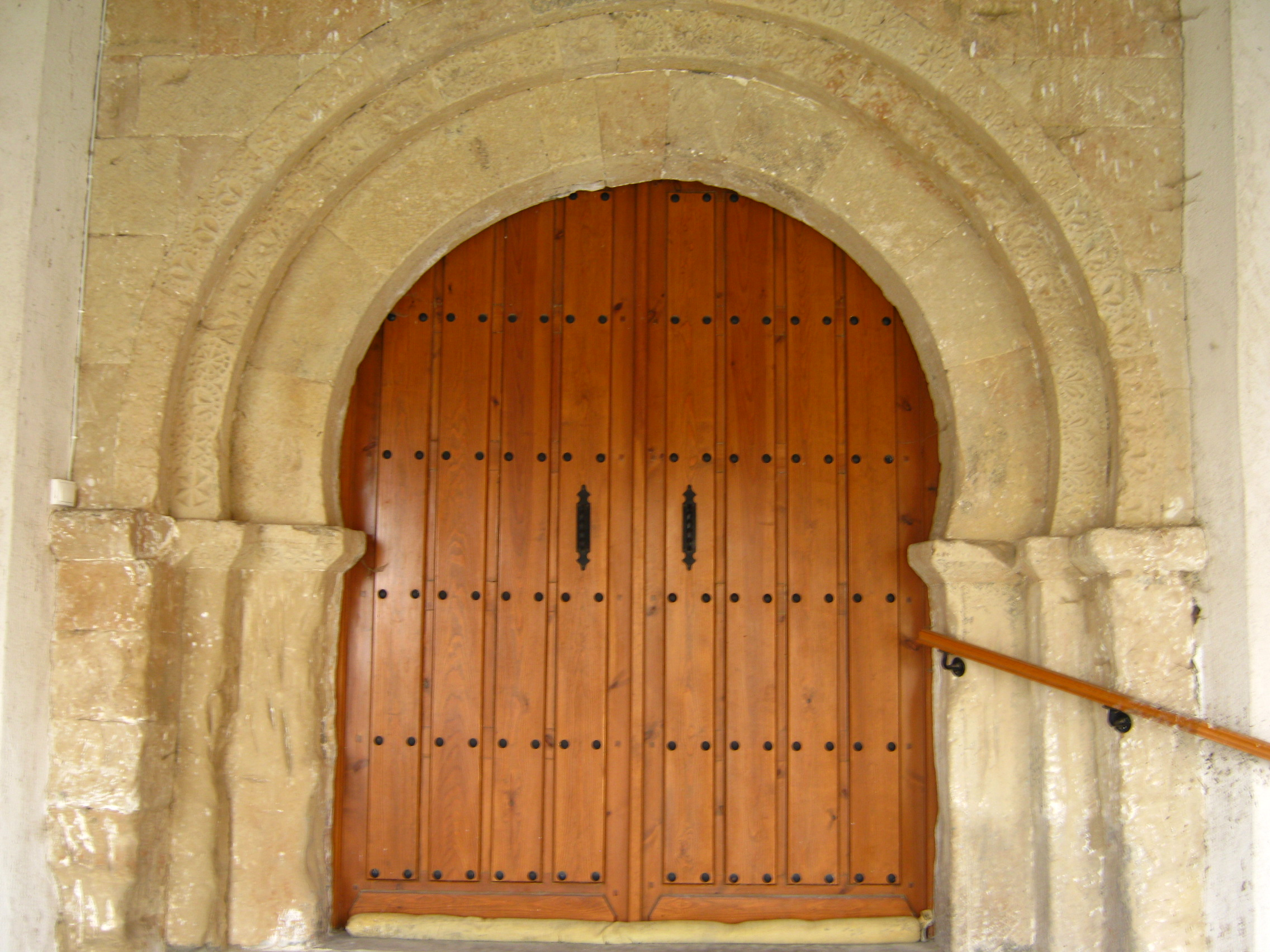 Portada románica de la iglesia de Villar de Gallimazo (Provincia de Salamanca, España)